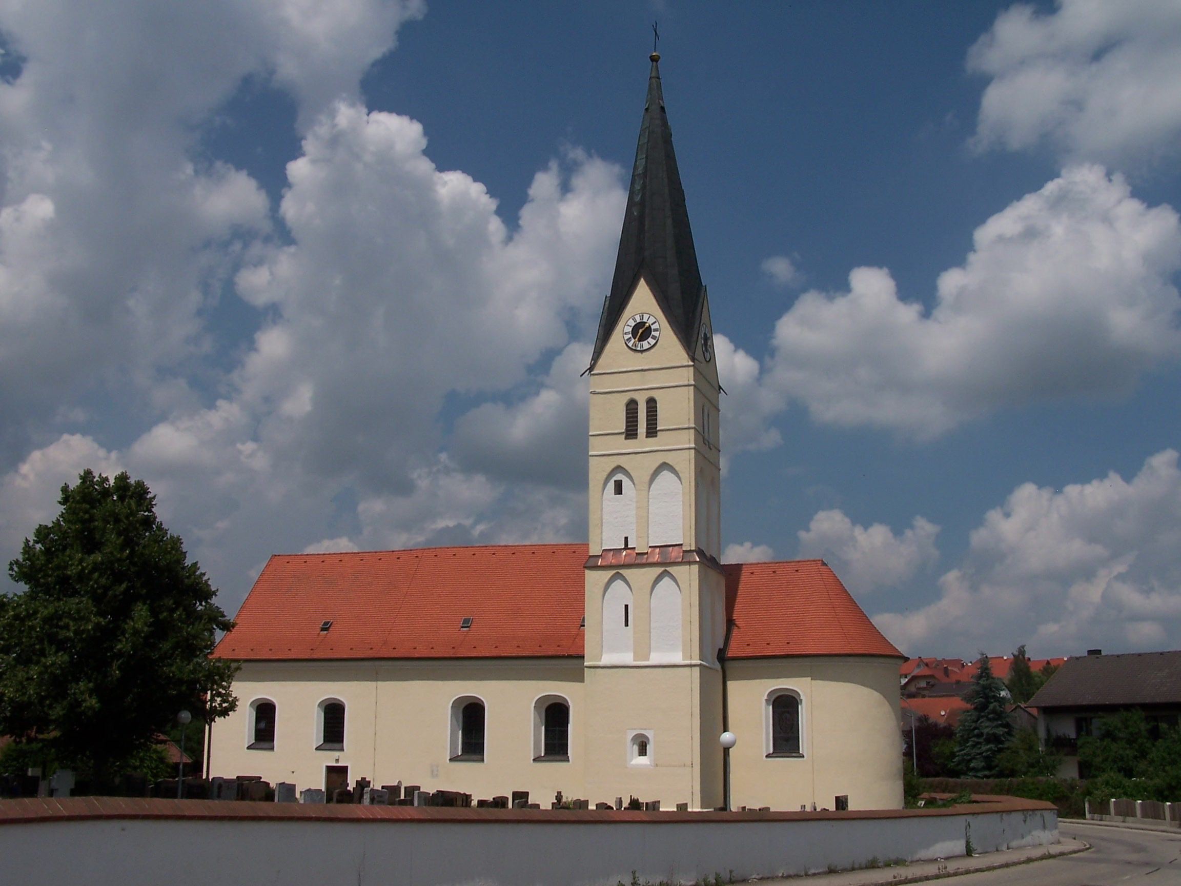 Essenbach, Mirskofen. Kath. Filialkirche St. Maria Dolorosa. 15. Jahrhundert, Mitte 18. Jahrhundert barockisiert, Turm spätgotisch; mit Ausstattung.